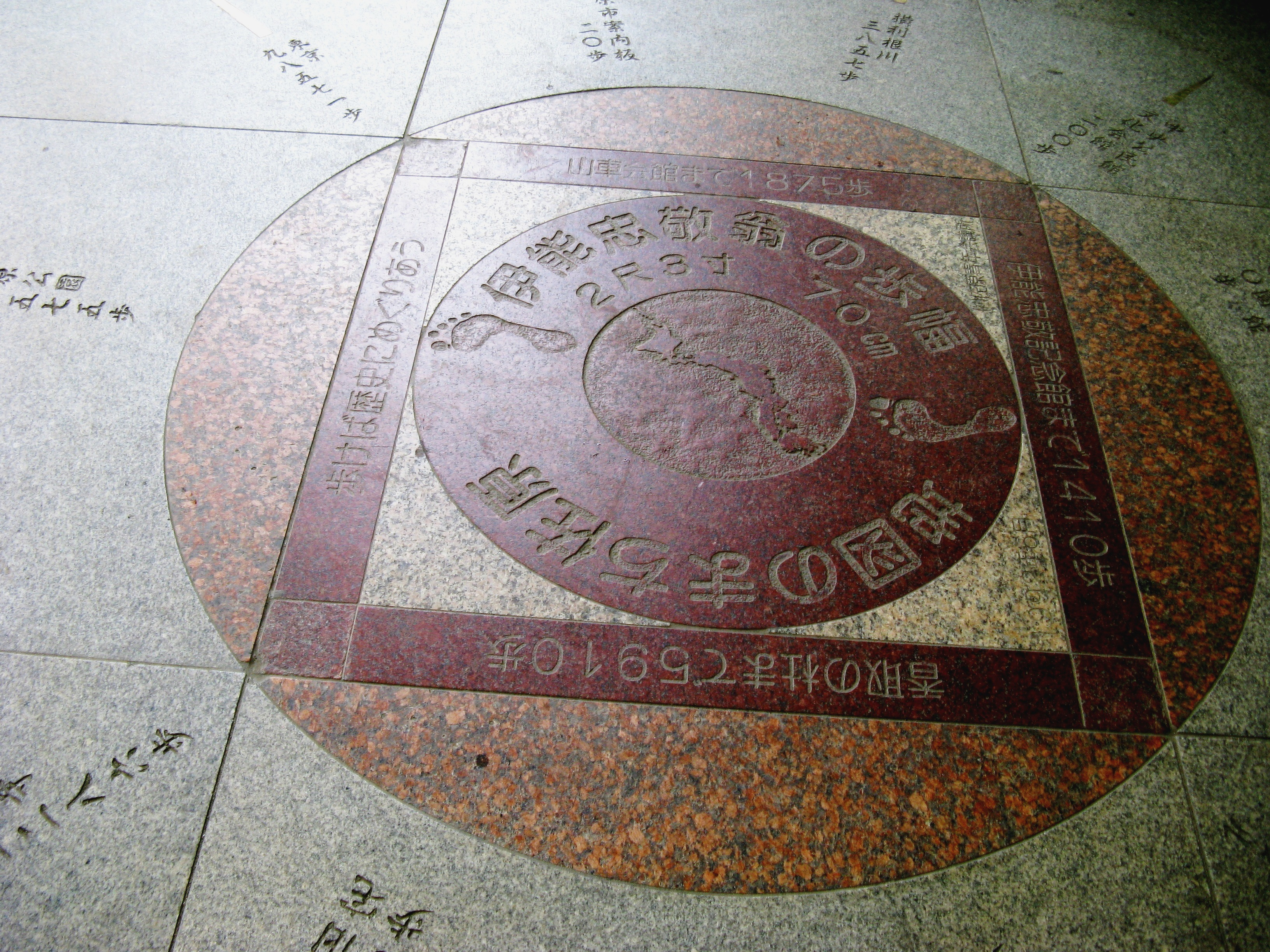 伊能忠敬の歩幅（2尺3寸）。佐原駅前にて。